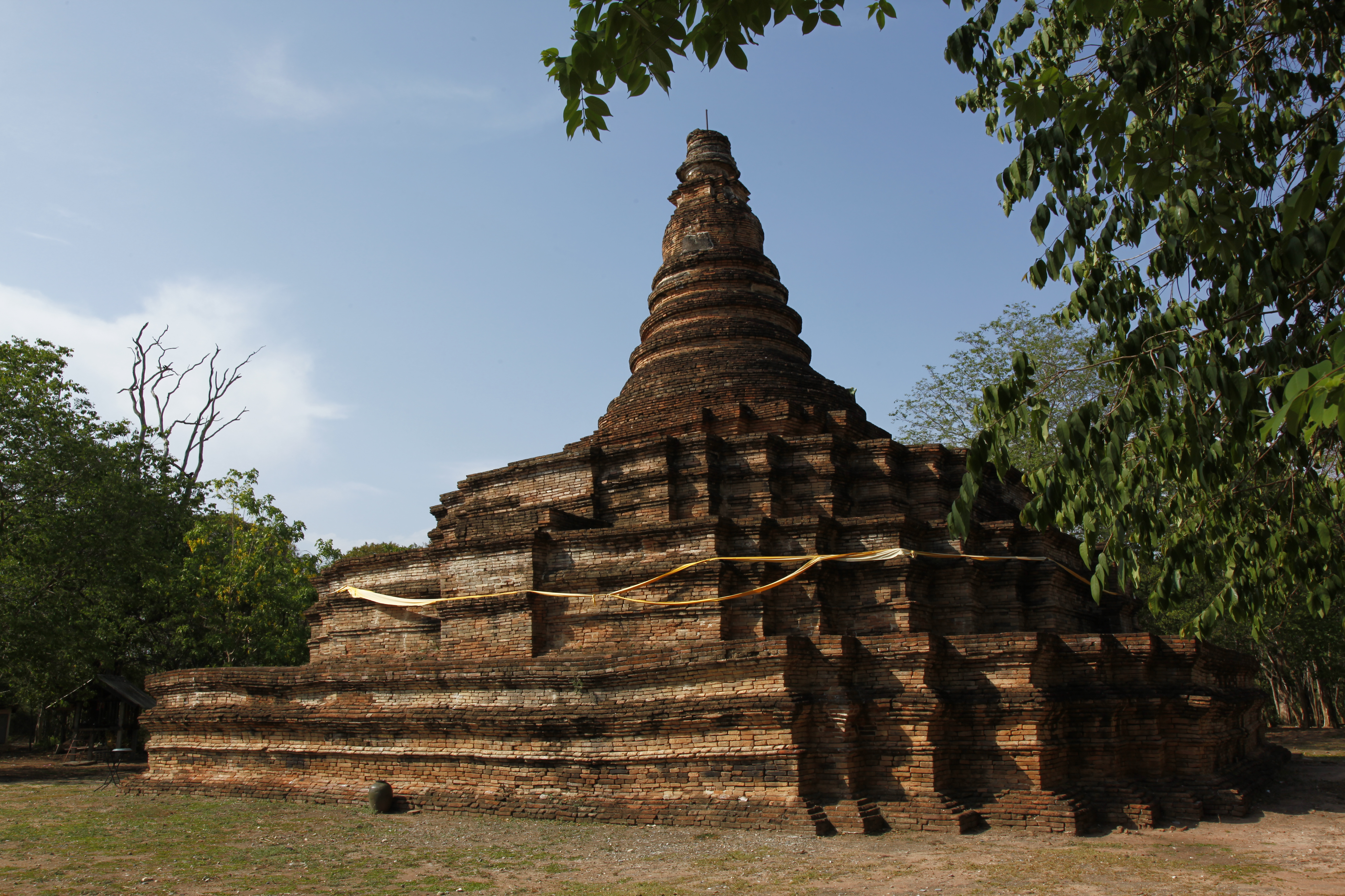 เจดีย์วัดต้นกอก (ร้าง)